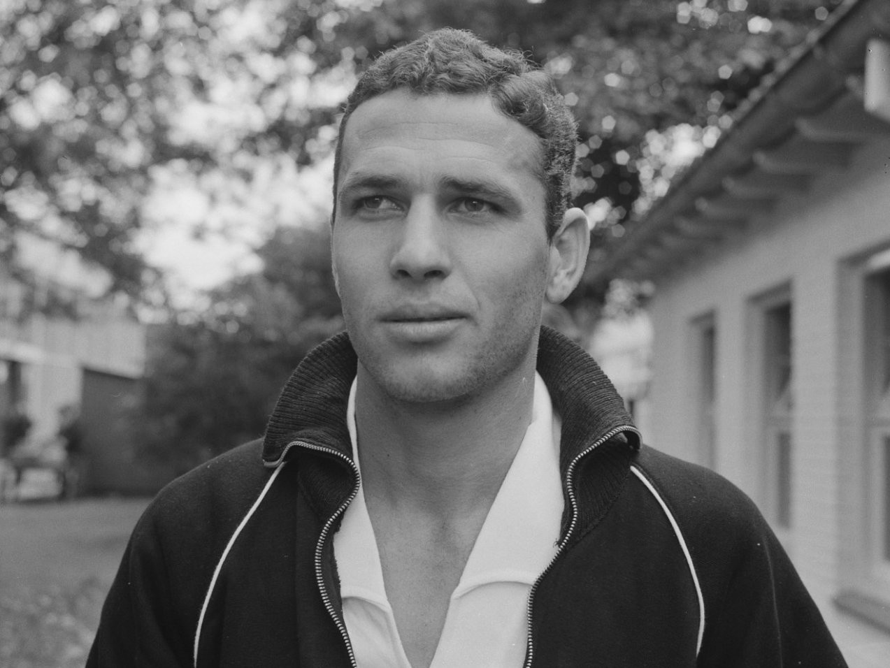 Telstar-Feyenoord, Carlos (kop), nieuwe speler van Telstar